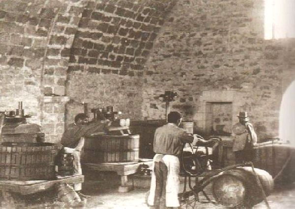 один из цехов винзавода Христофорова. 19 век